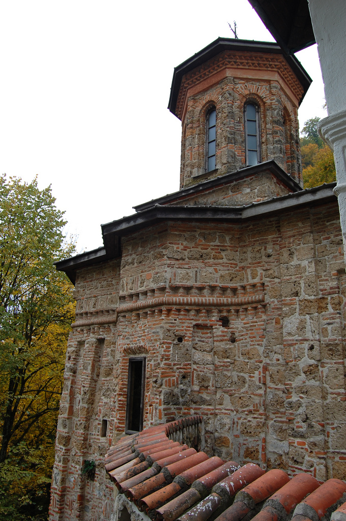 Zidul_exterior_manastirea_Tismana, Gorj